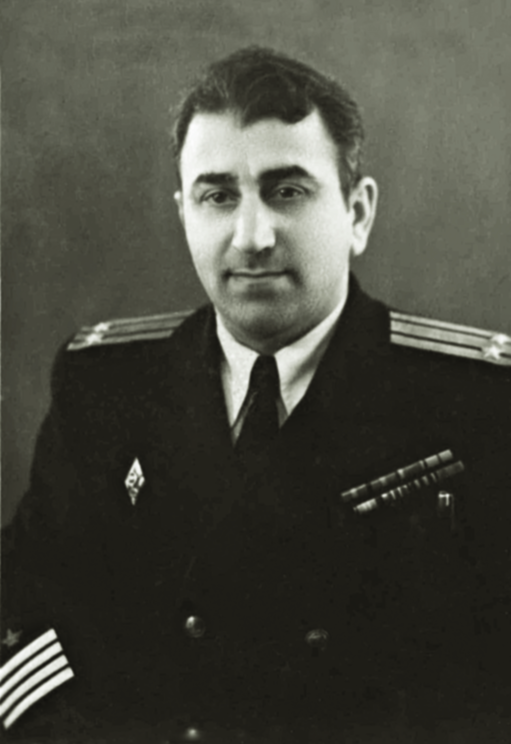 Cəlil Cavadov